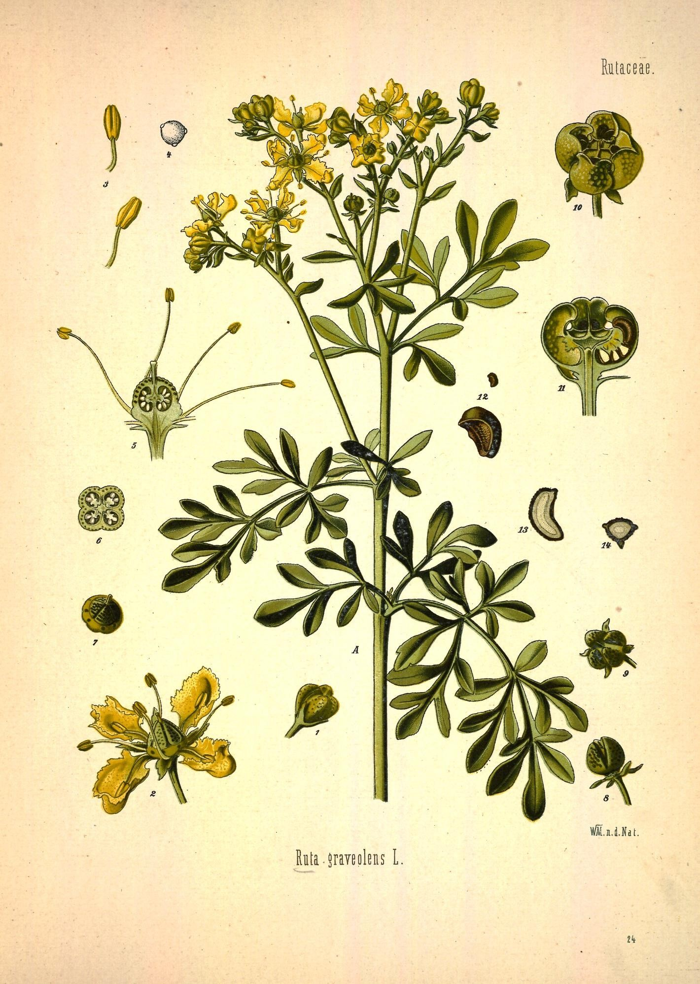 Gartenraute. A blühender Stengel in natürl. Grösse; 1 Blüthenknospe, vergrössert; 2 vierzählige Blüthe, desgl.; 3 Staubgefäss, desgl.; 4 Pollen, desgl.; 5 Stempel im Längsschnitt, desgl.; 6 Fruchtknoten im Querschnitt, desgl.; 7 Fruchtknoten von oben, desgl.; 8 u. 9 Frucht in natürl. Grösse; 10 dieselbe, vergrössert; 11 dieselbe im Längsschnitt, desgl.; 12 Same, natürl. Grösse und vergrössert; 13 derselbe im Längsschnitt, vergrössert; 14 derselbe im Querschnitt, desgl.